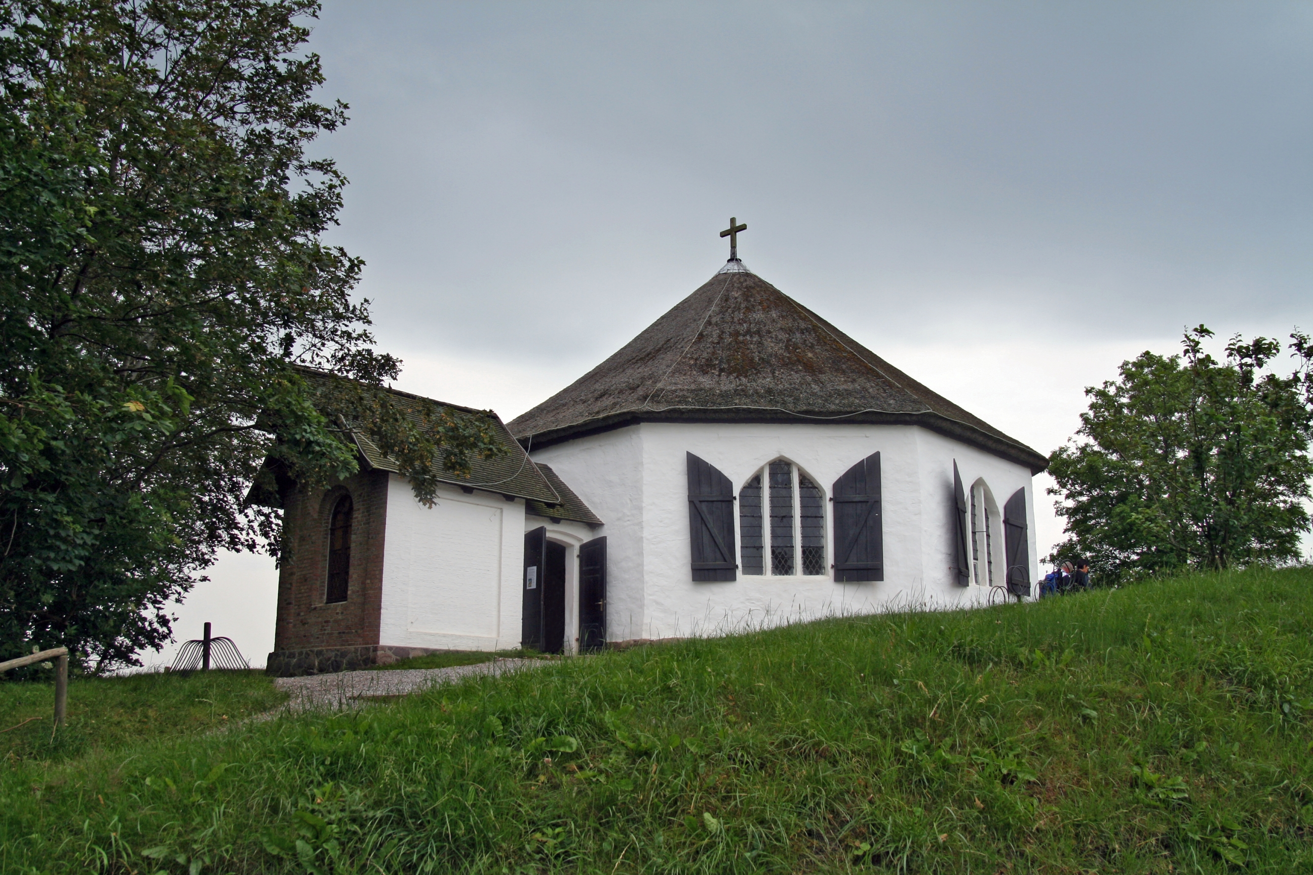 Vitt, Rügen, chapel